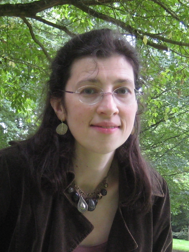 Nathalie Slosse september 2015